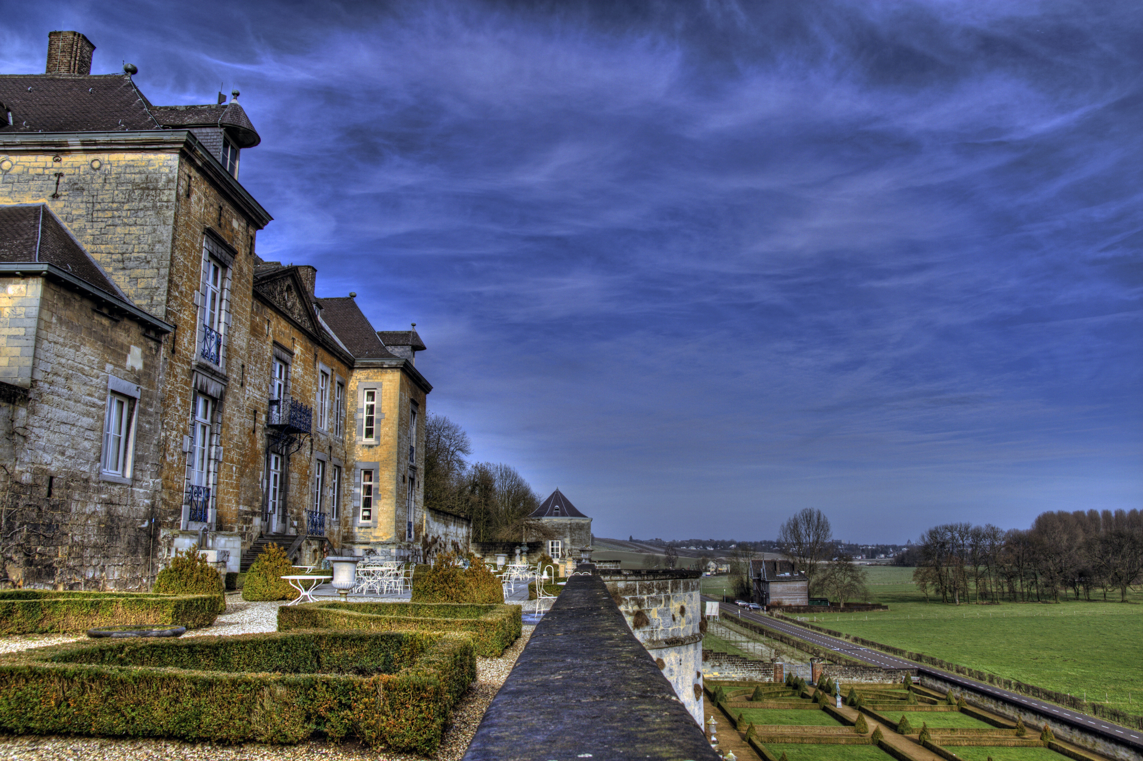 Kanne / Maastricht